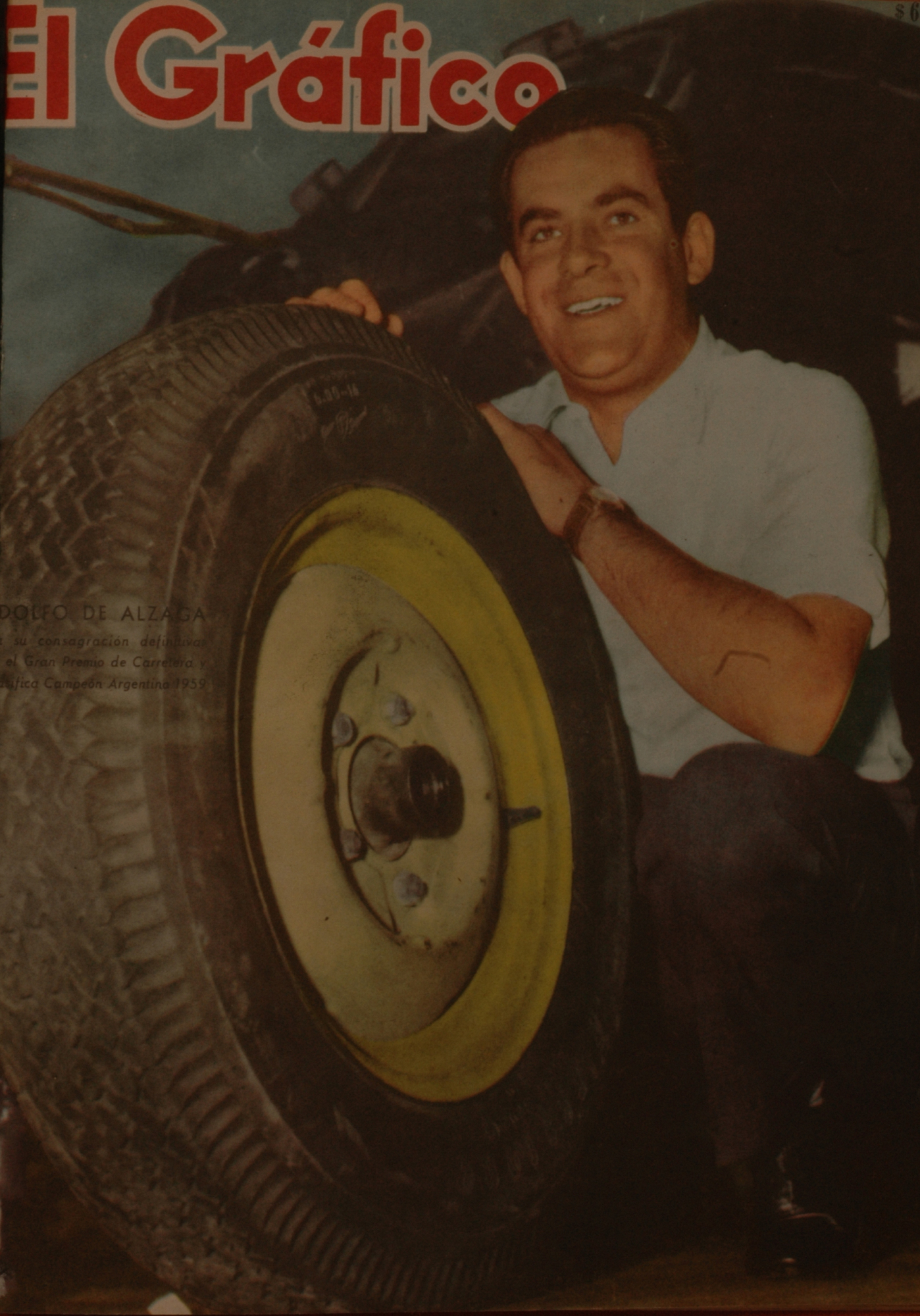 El Grafico del 02 de Diciembre de 1959. Edicion 2097